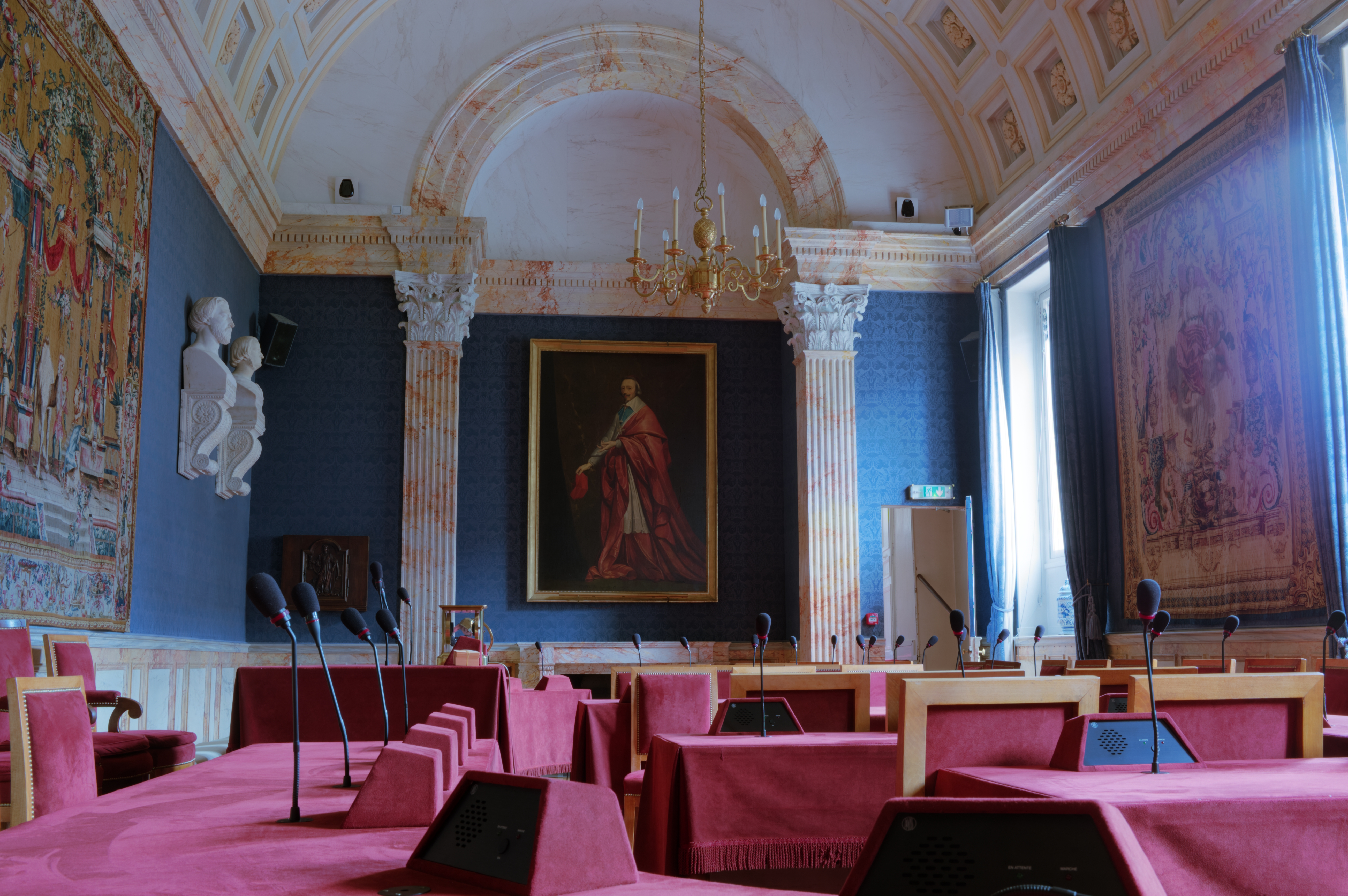 Institut de France, Paris. Petite salle des séances.